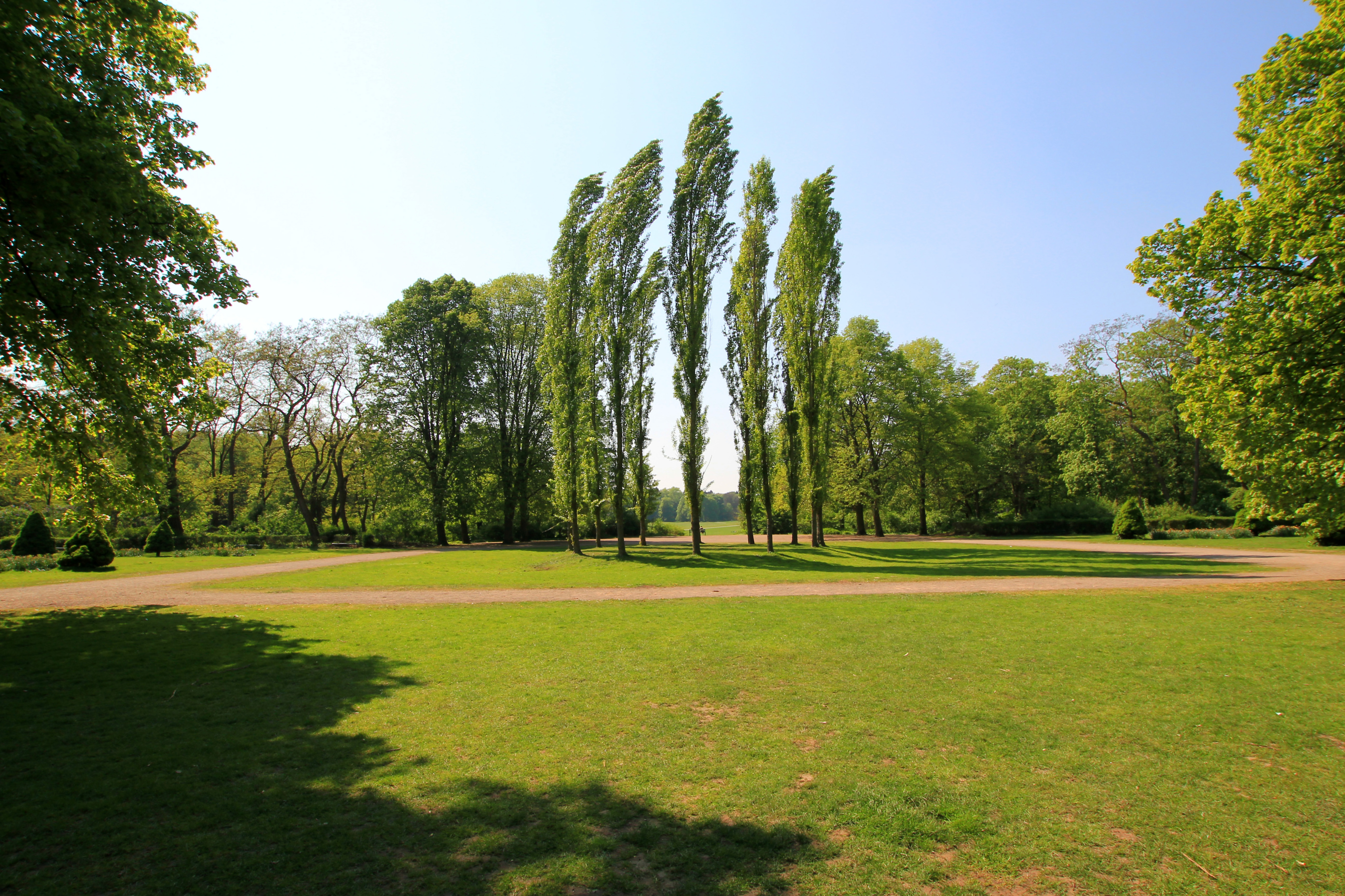 Beethovenpark Köln-Sülz, Zugang Neuenhöfer Allee